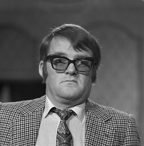 Clous van Mechelen als Jan Vos in de Nederlandse televisieserie De lachende scheerkwast in 1981